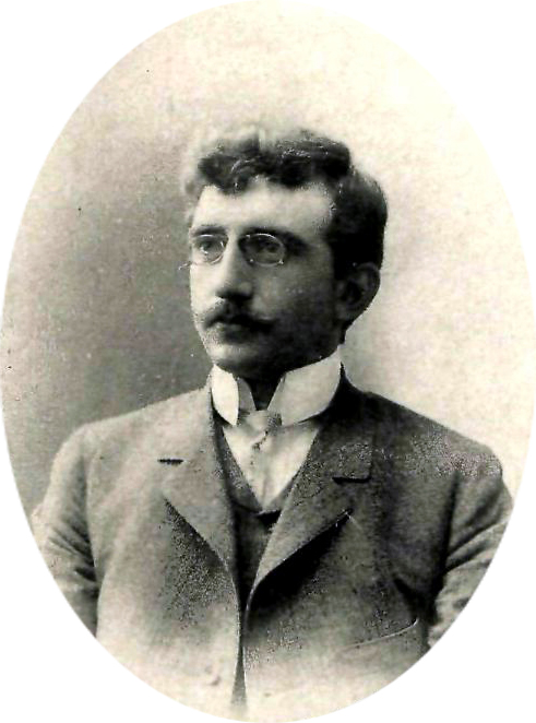 Воробьёв, Владимир Петрович (анатом)